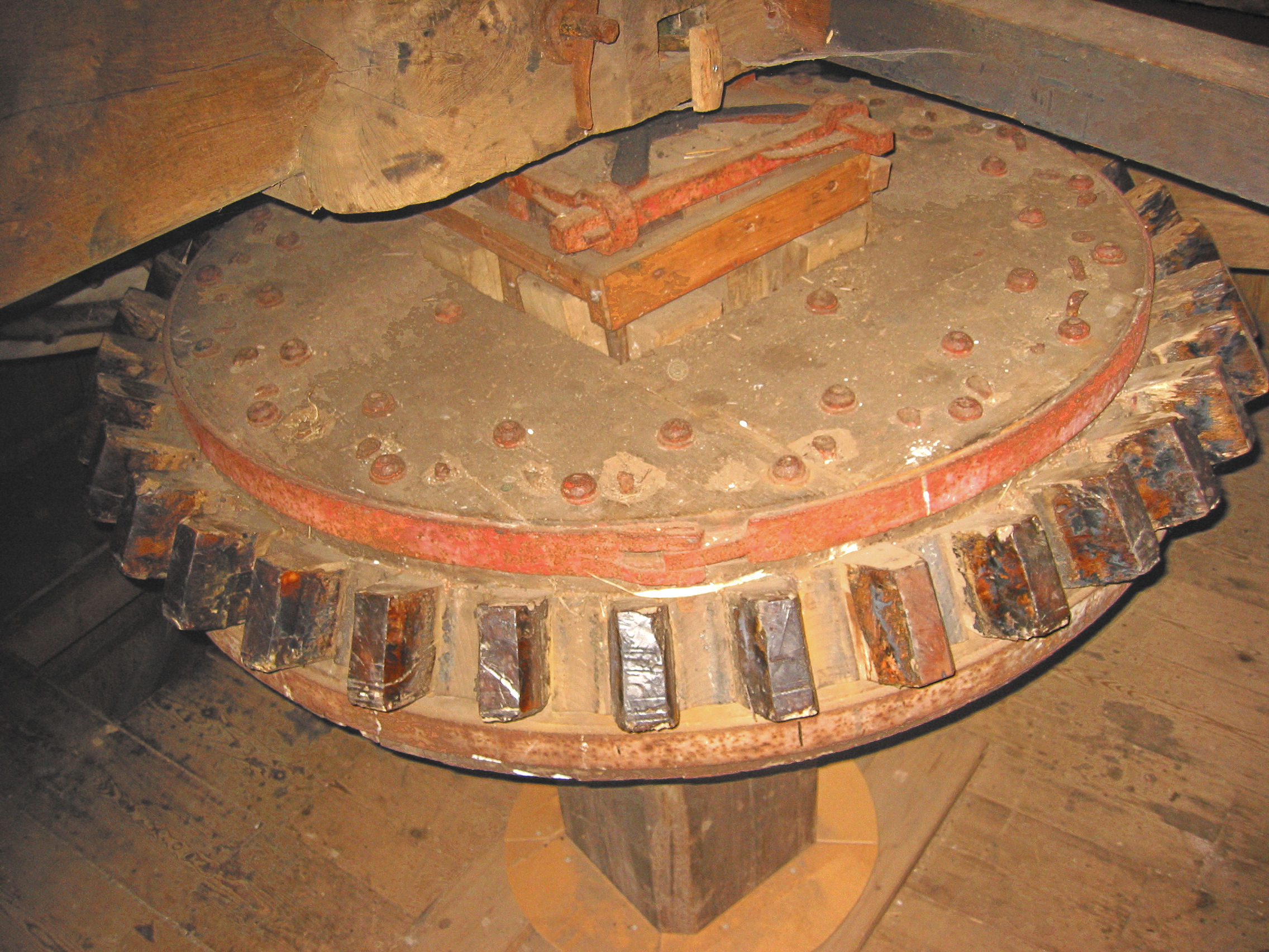 Walderveense molen bonkelaar, Gelderland, the Netherlands